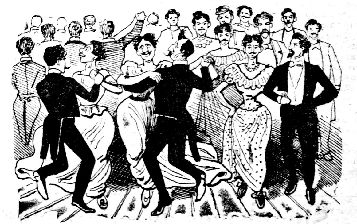 El baile de los 41 maricones